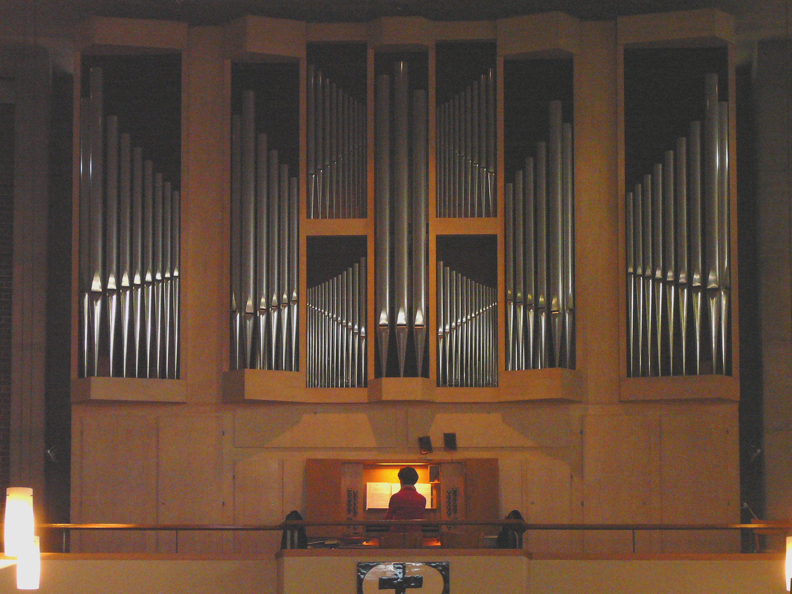 Römisch-katholische Pfarrkirche St. Laurentius Winterthur-Wülflingen, Orgel